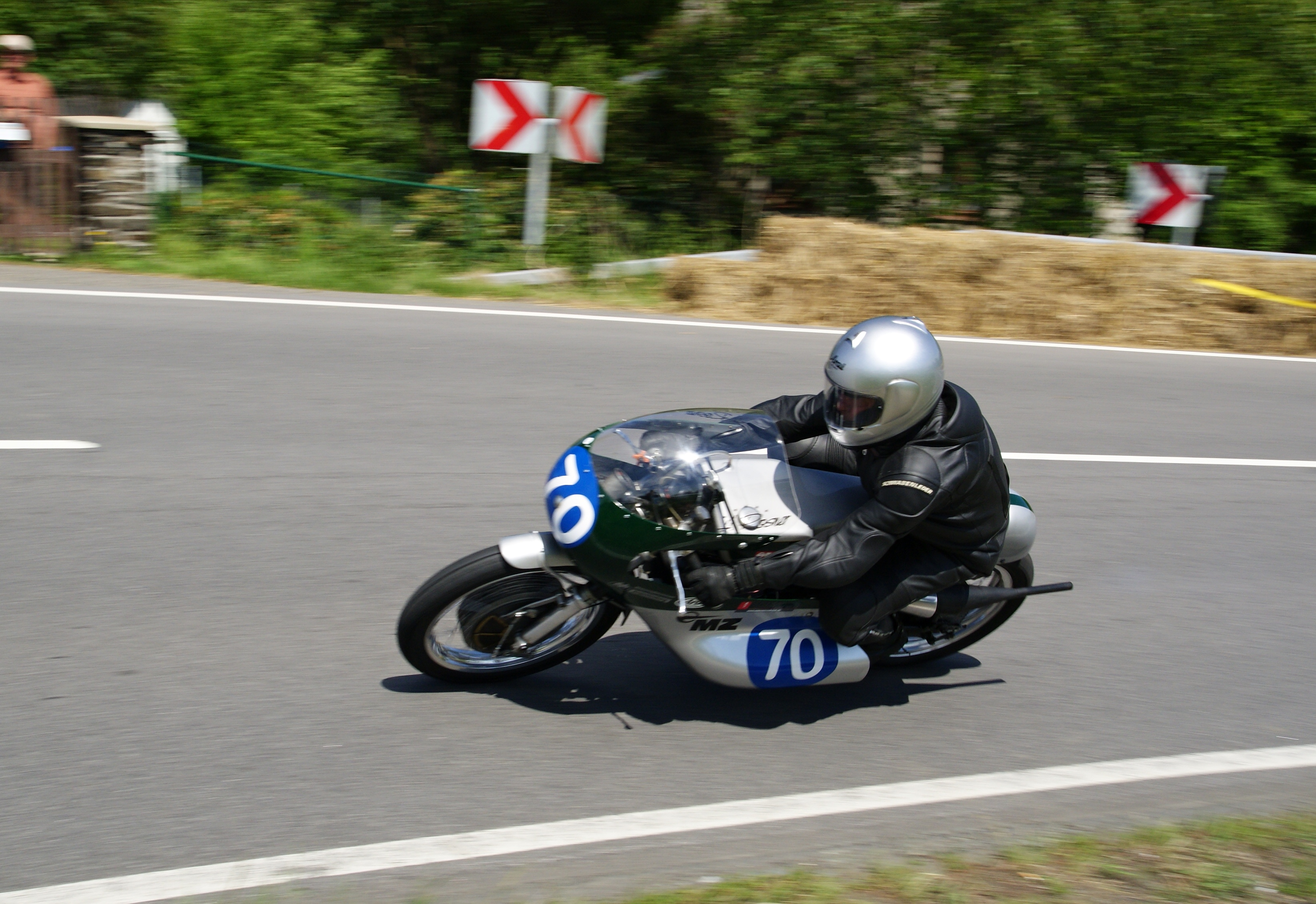 Zschopauer Classic Heinz Rosner auf MZ